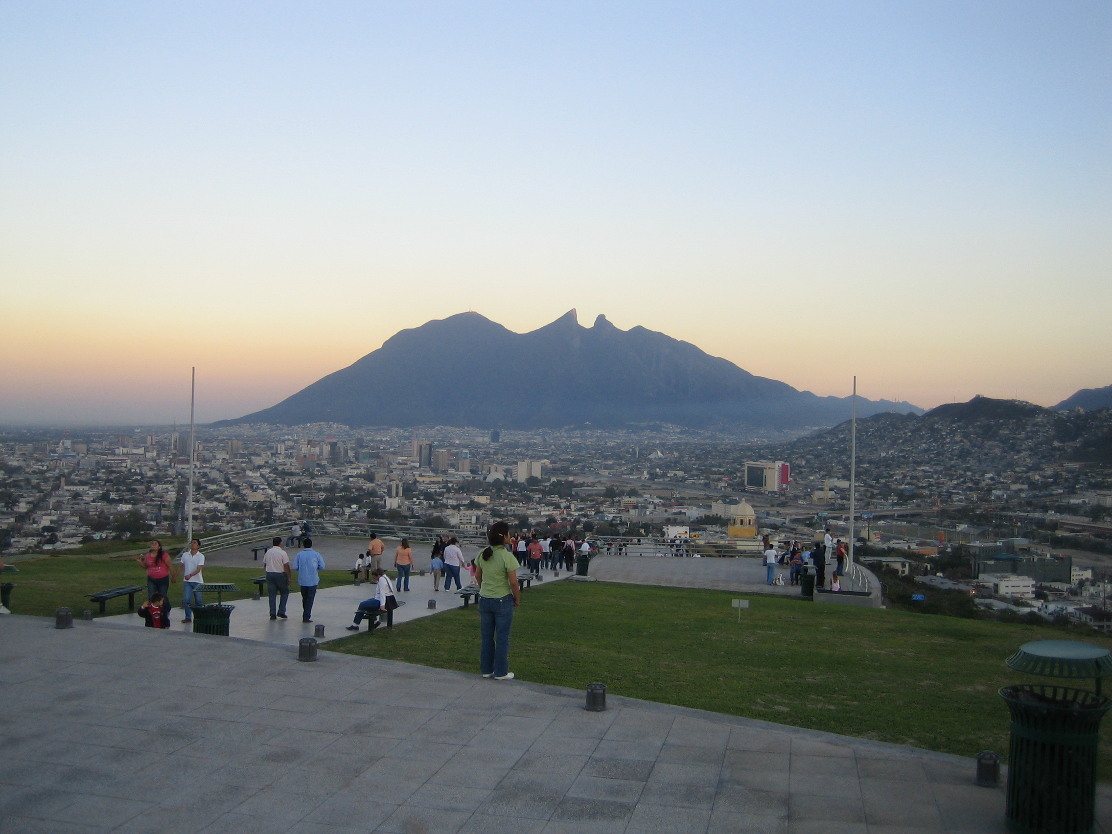 Monterrey desde la MacroBandera en el Cerro del Obispado